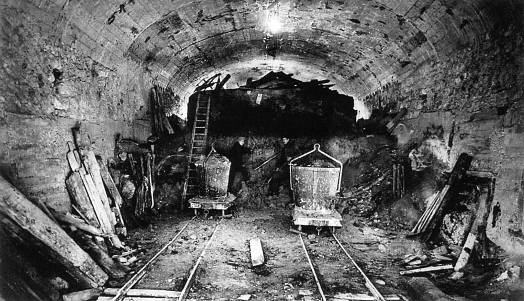 Travaux de construction de la ligne 9 du métro de Paris, France.